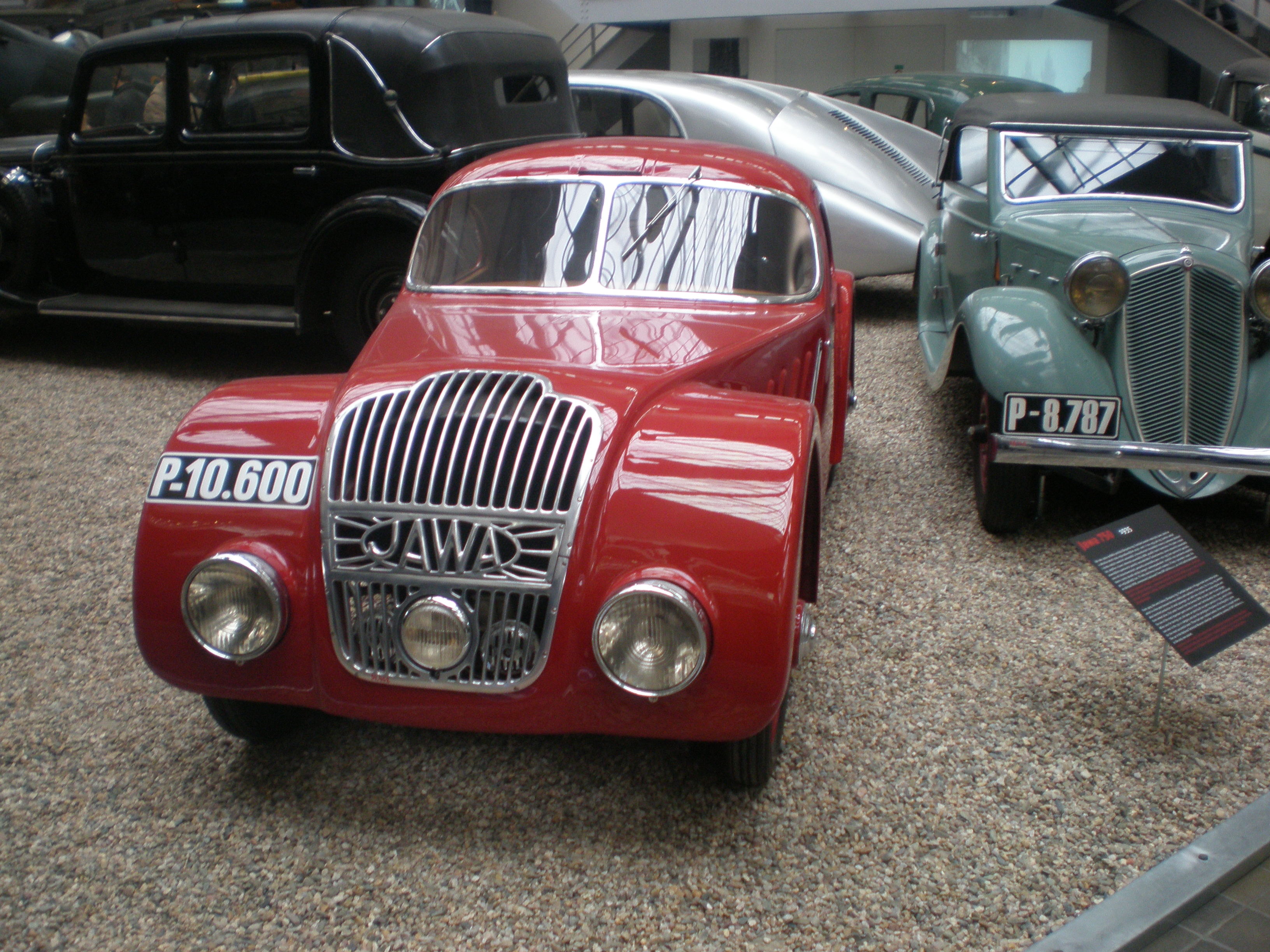 Jawa 750, jediný dochovaný exemplář (postaveno 6 ks)